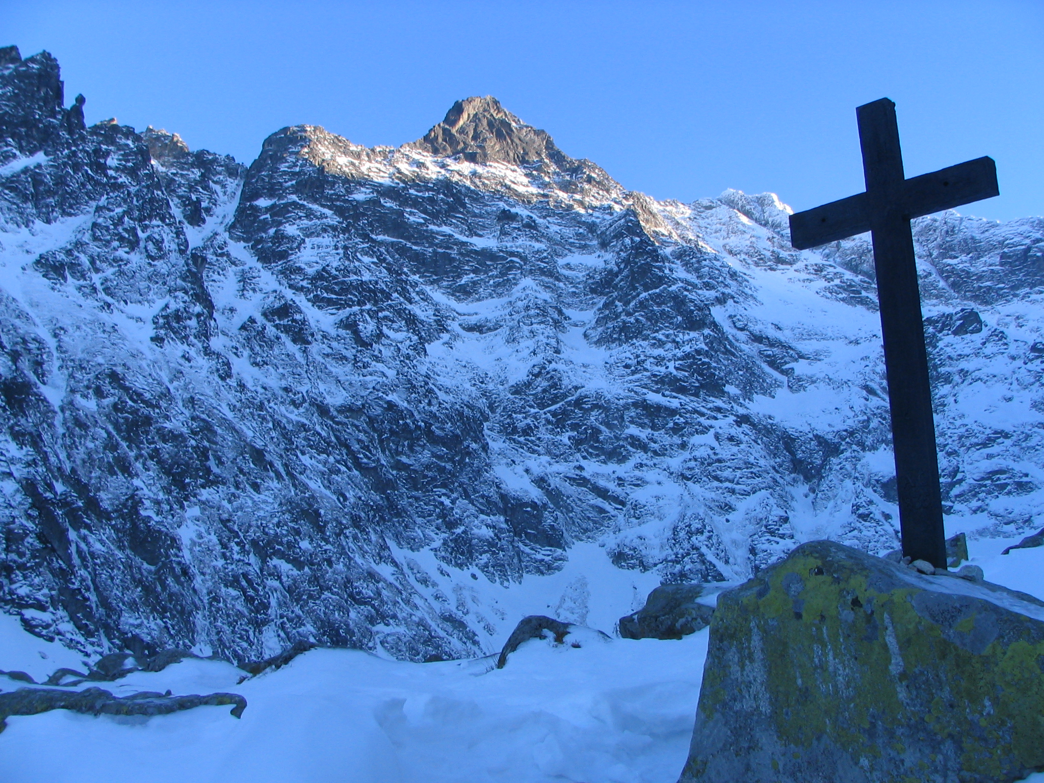 Niżnie Rysy i Rysy widziane z nad Czarnego Stawu pod Rysami